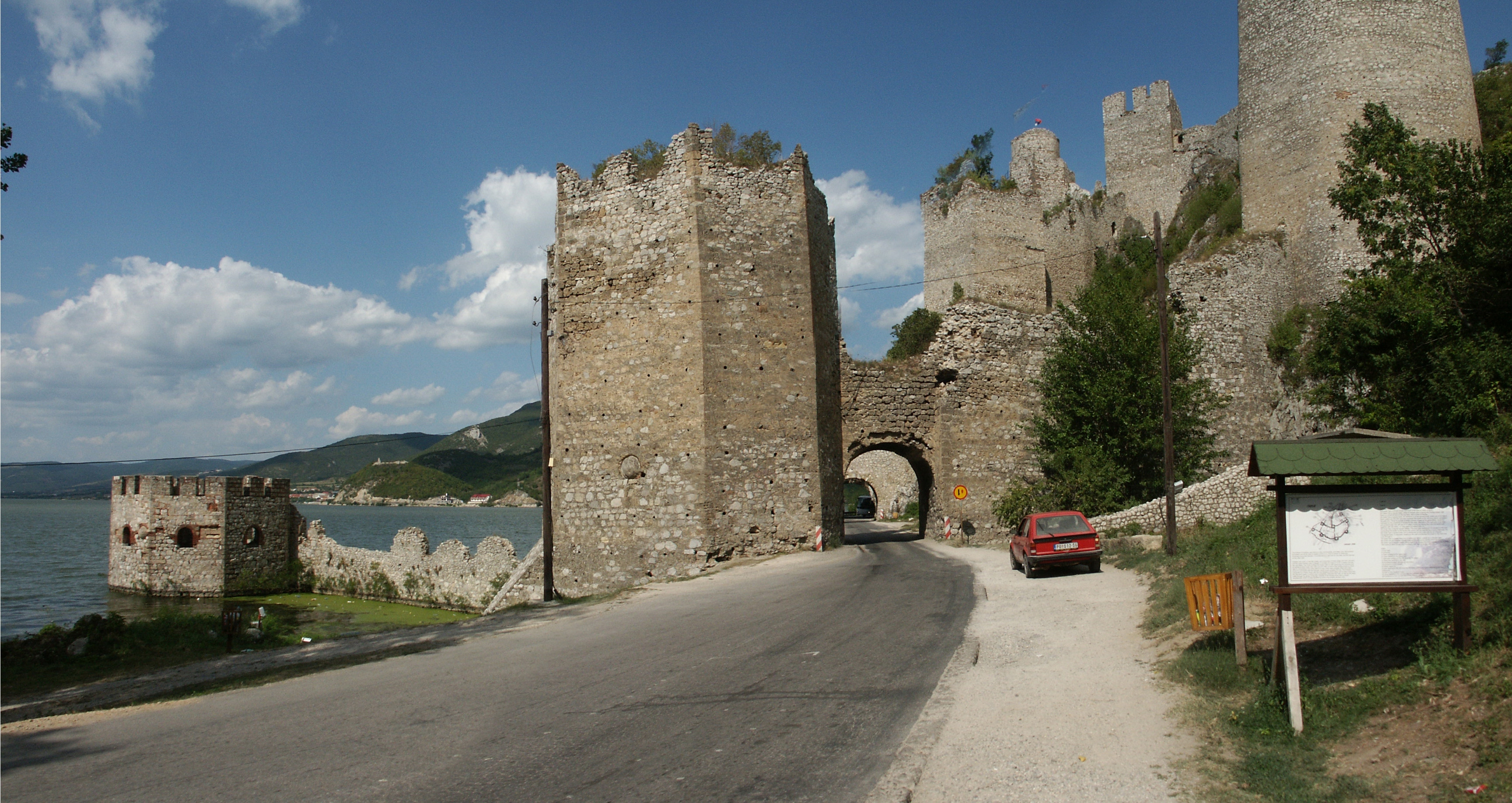 Fortezza di Golubac